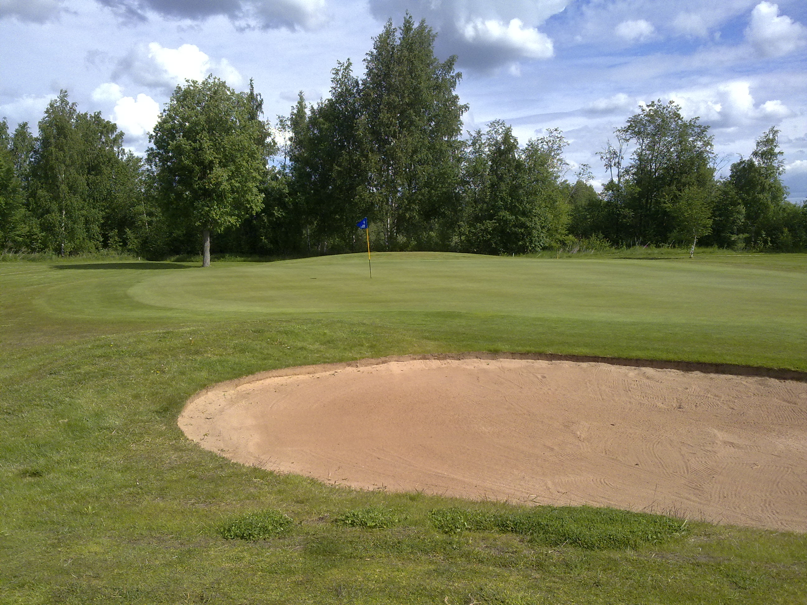 Kalafornian golf-kentän reikä numero 13.